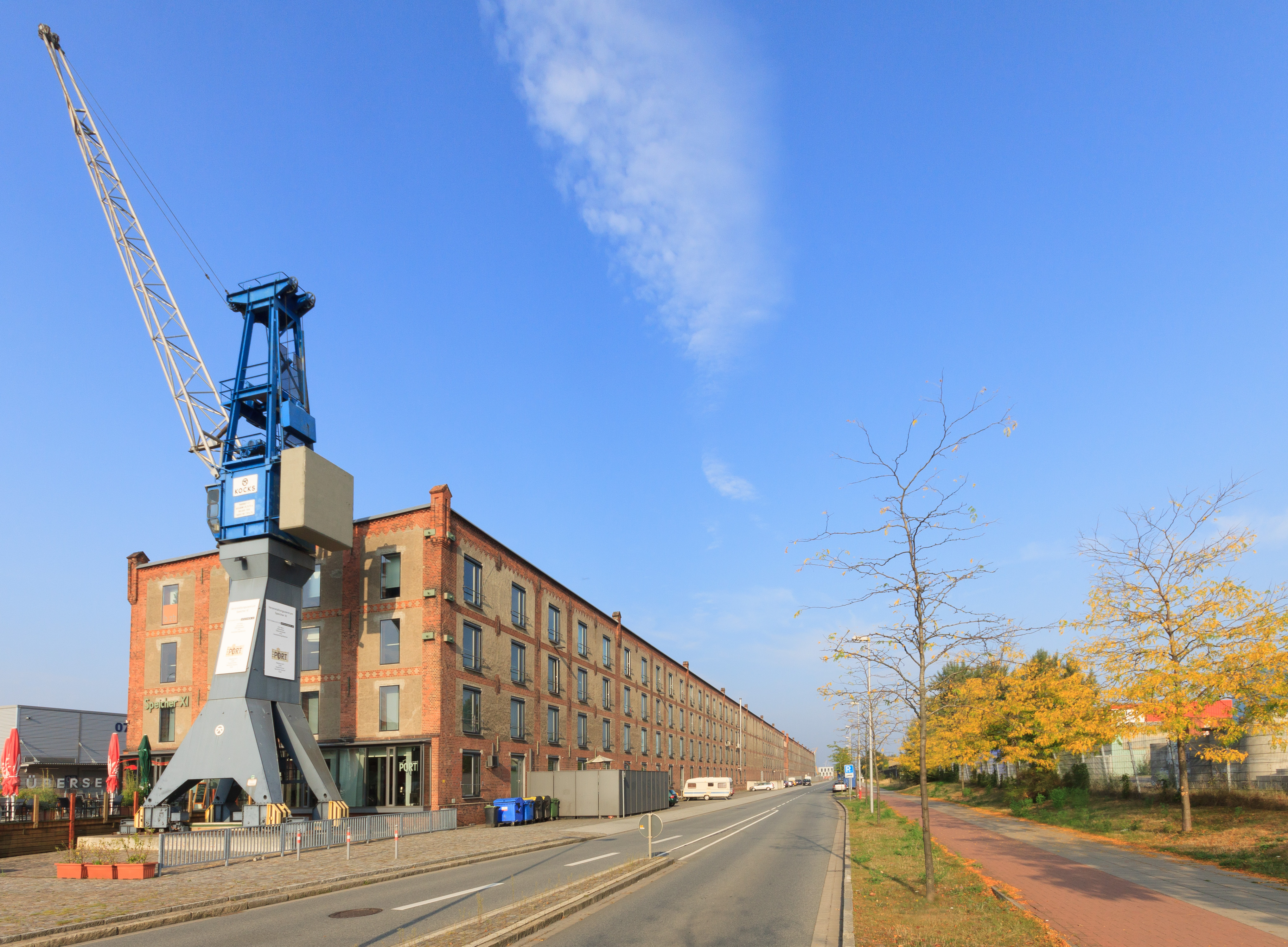 Speicher XI in Bremen, Am Speicher XI 1Das abgebildete Objekt ist ein geschütztes Kulturdenkmal in der Freien Hansestadt Bremen, mit der Nr. 0324 beim Landesamt für Denkmalpflege registriert.